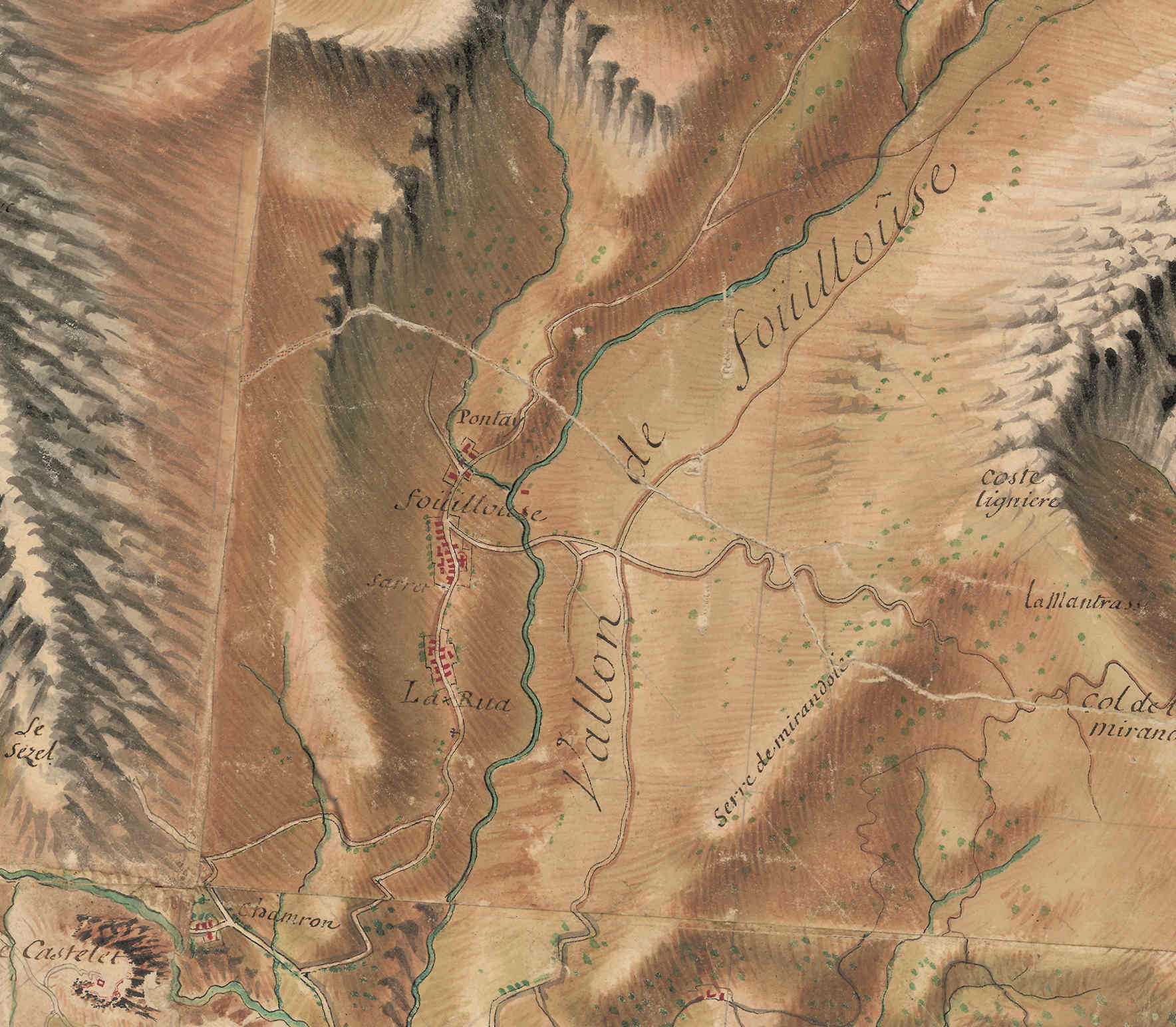 carte de Bourcet numérisé Paris, Nicolas-Alexandre et Olivier-Joseph, Extrait réduc JPG 30% Antoine-H